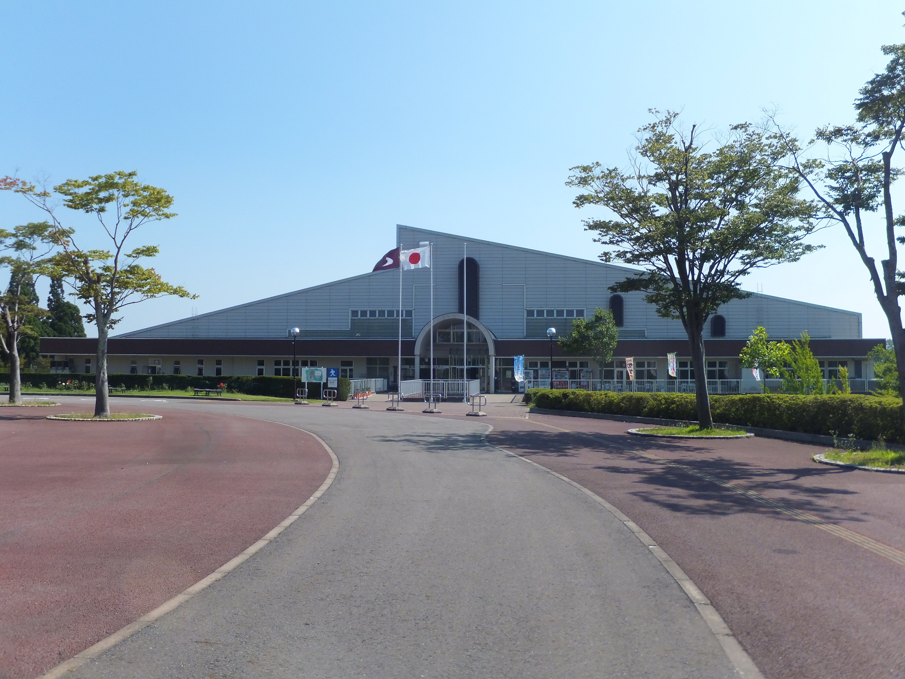 秋田県立中央公園、管理事務所およびトレーニングセンター。この後ろに宿泊棟がある。